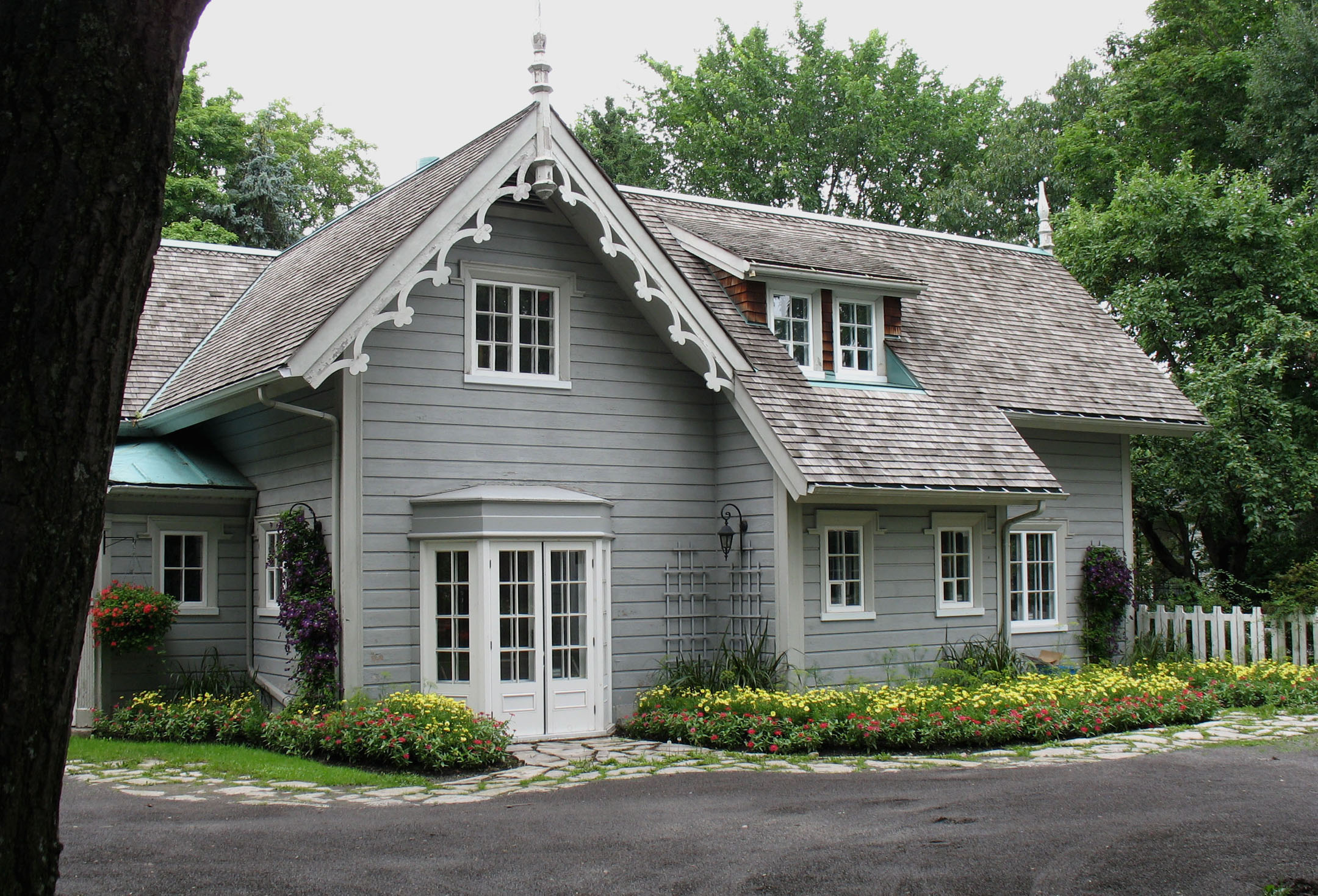 Villa Bagatelle, bâtisse du XIXe siècle située à Québec dans l'arrondissement de Sainte-Foy–Sillery. Province de Québec. Canada